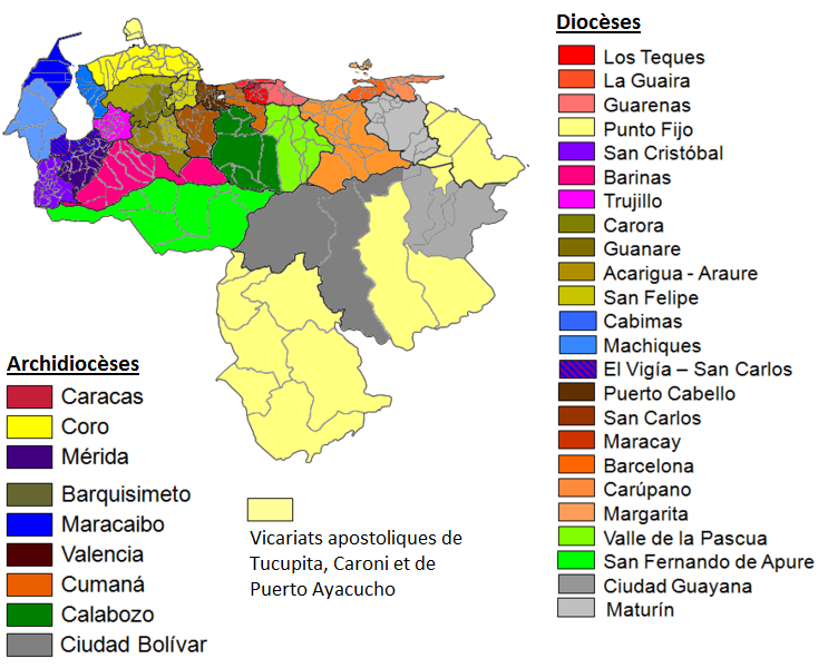 Cartes des archidiocèses, diocèses et vicariats apostoliques de l'église catholique au Venezuela.